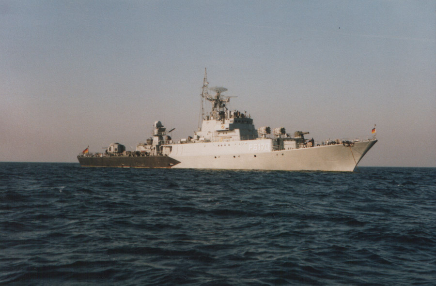 Küstenschutzschiff Wismar mit NATO-Kennung P 6170 ca. 1991 im Dienst der Bundesmarine